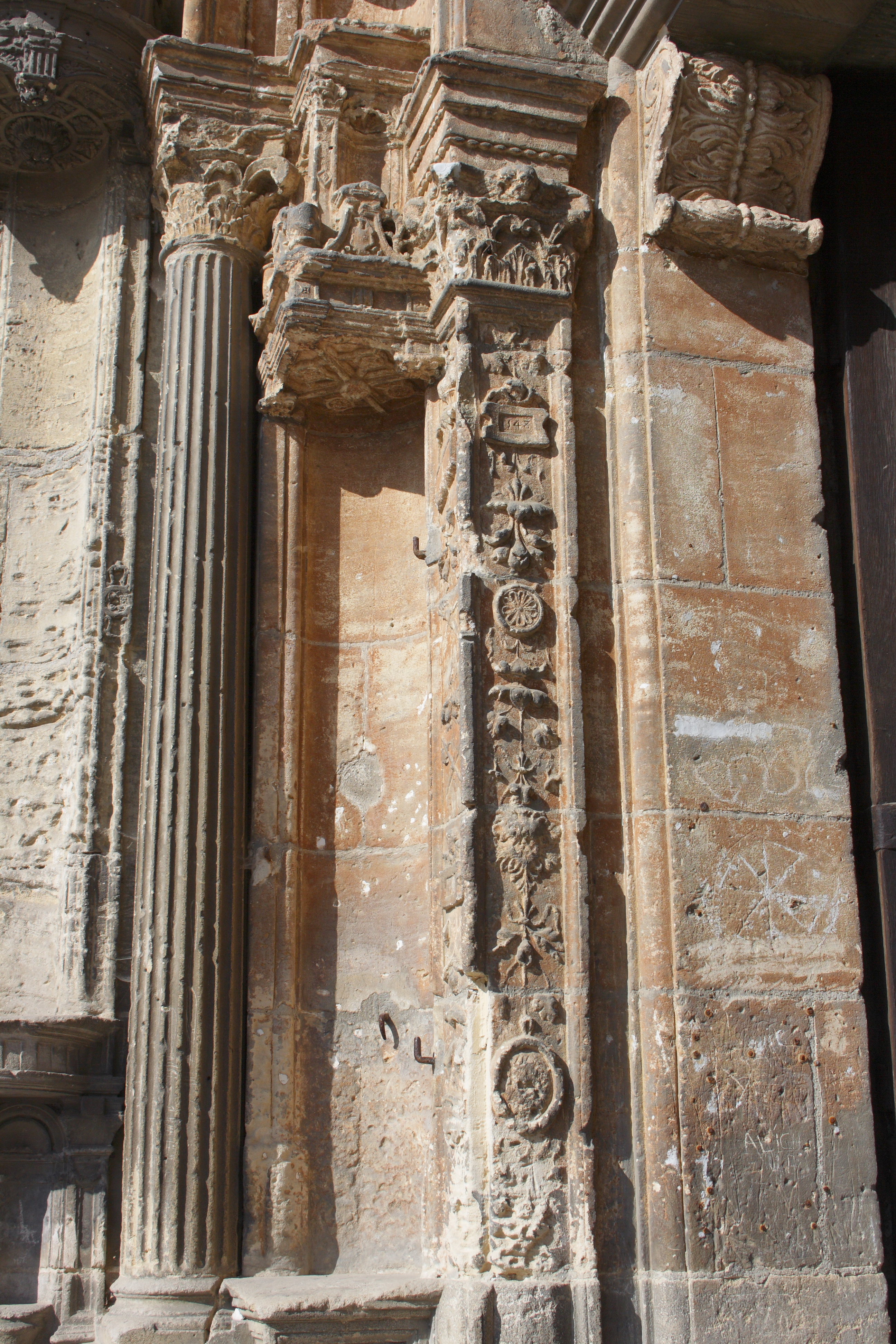 Renaissancefassade der Kirche Notre-Dame-de-la-Nativité in Magny-en-Vexin